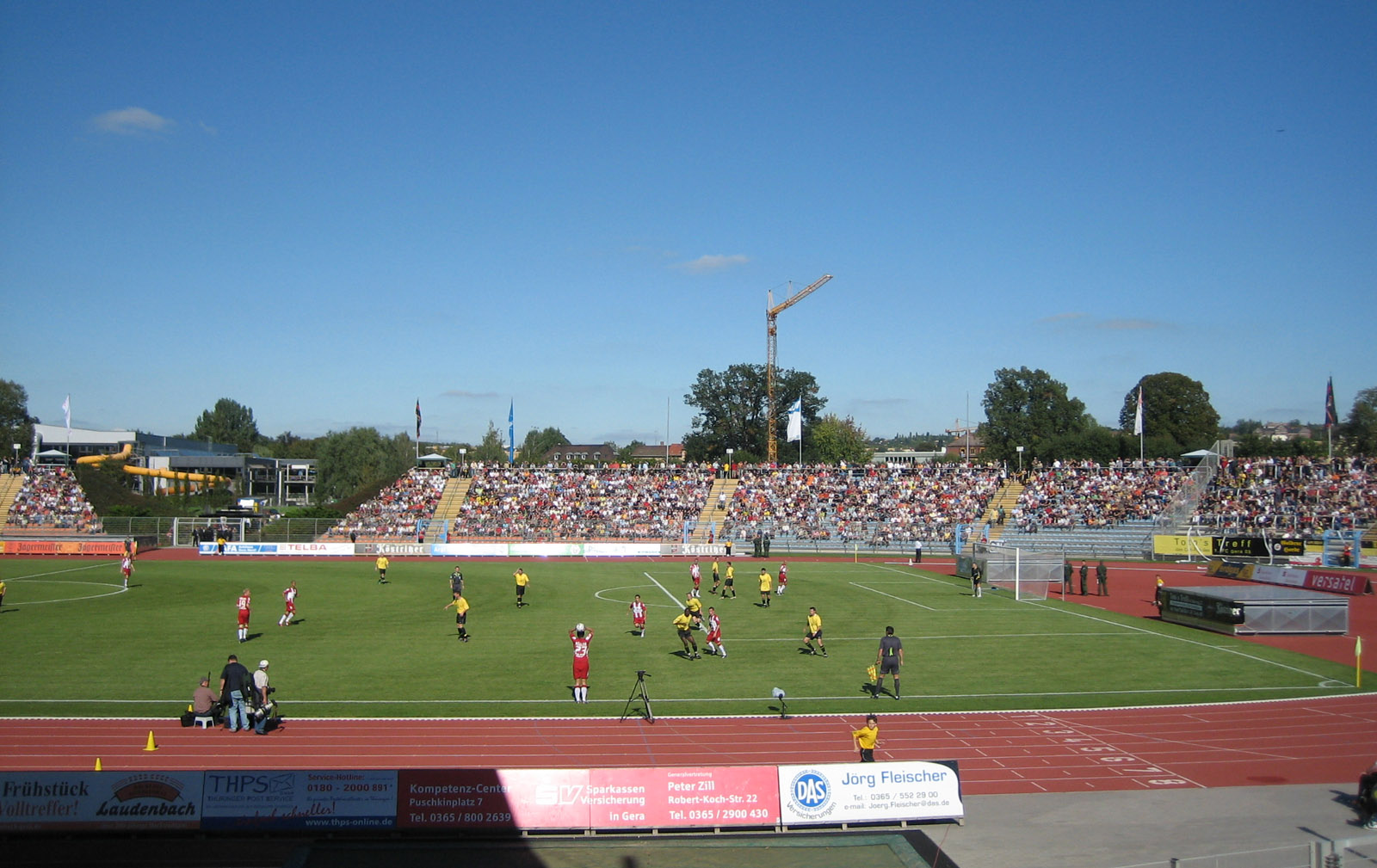 DFB-Pokalspiel zwischen dem 1. FC Gera 03 (gelbe Trikots) und dem 1. FC Kaiserslautern (rot-weiße Trikots) im Stadion der Freundschaft in Gera.